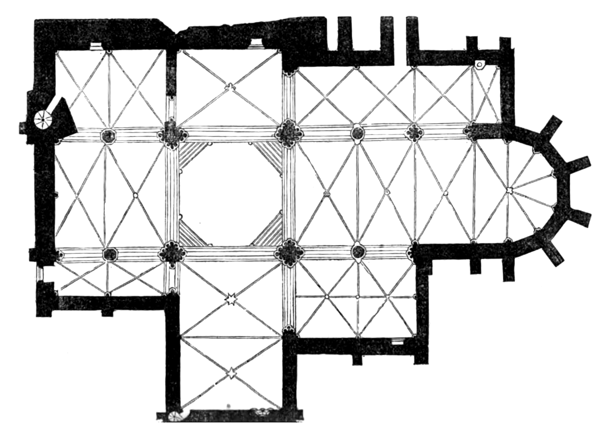 Plan de l'ancienne église abbatiale de Saint-Sever (Normandie, France).